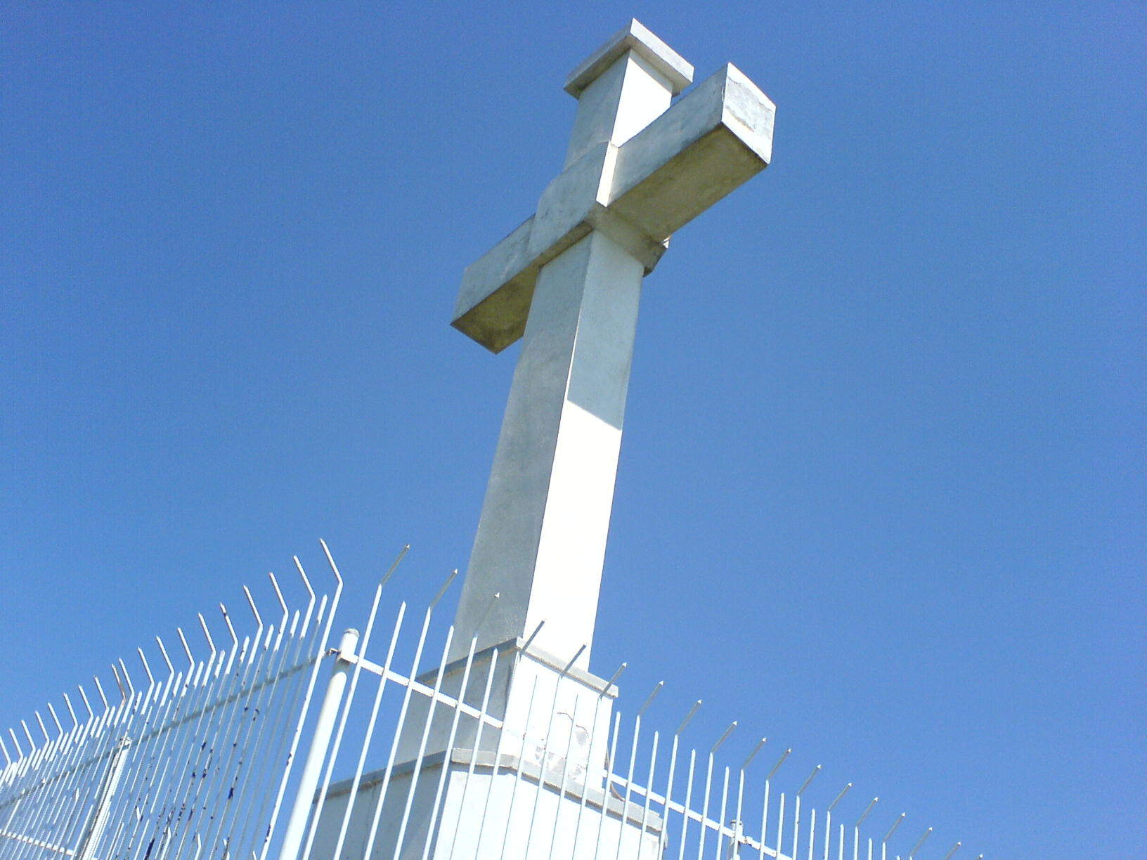 Crucea Eroilor de pe Dealul Gurga din Breaza, Prahova